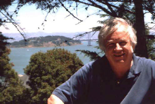 James H. Fetzer